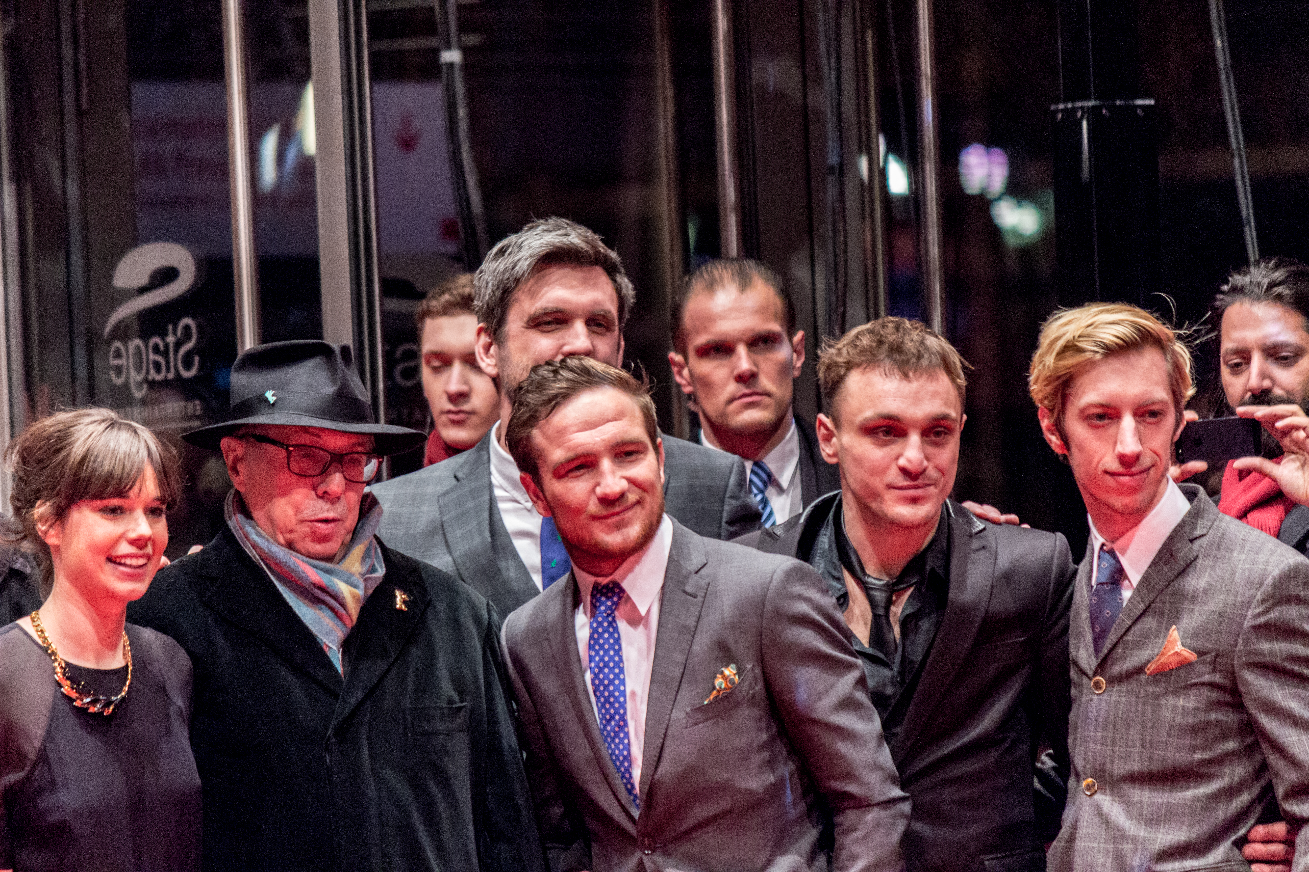 Filmcrew von Victoria auf der Berlinale mit Festivaldirektor Dieter Kosslick